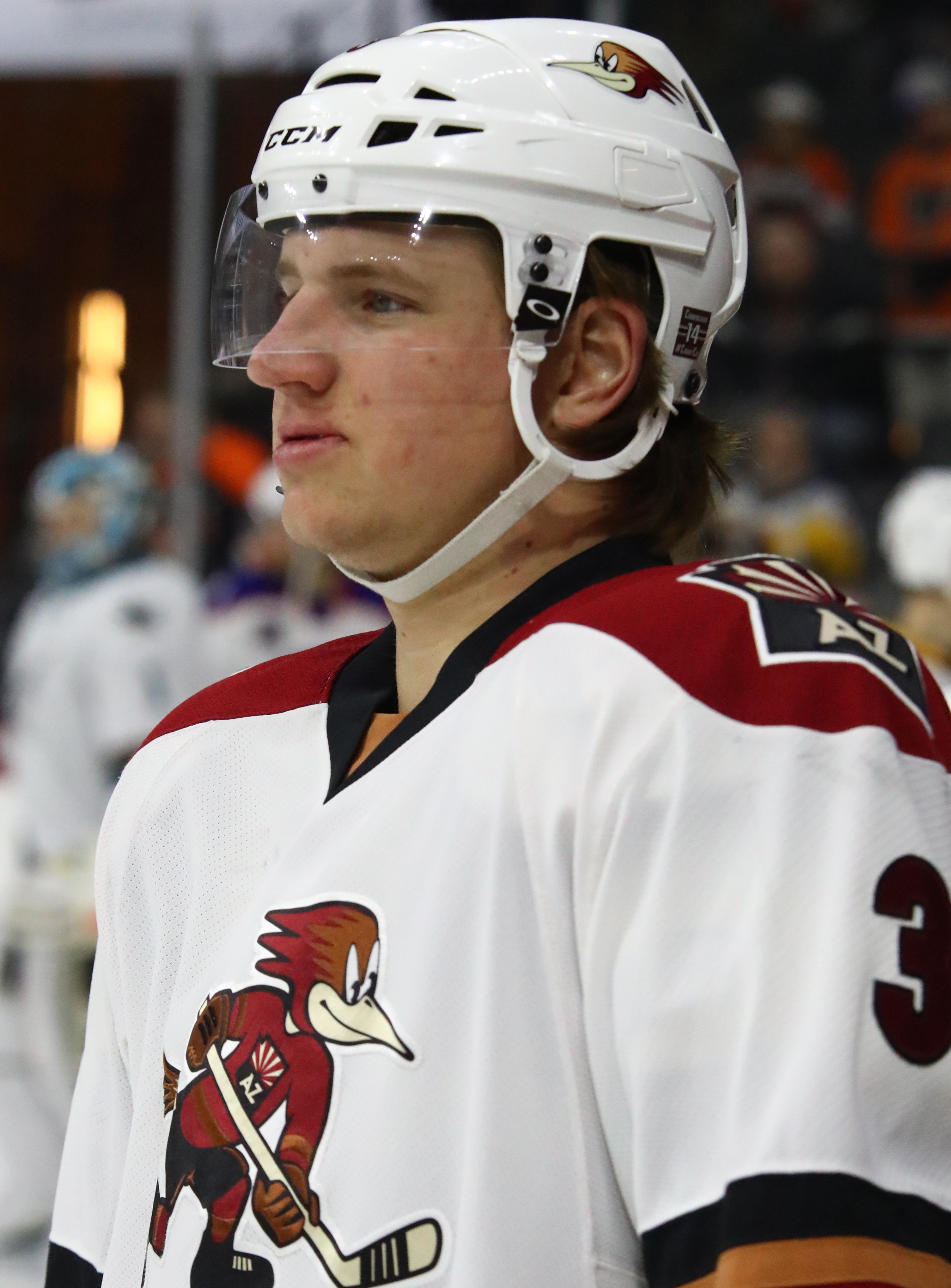 BZ3I5848